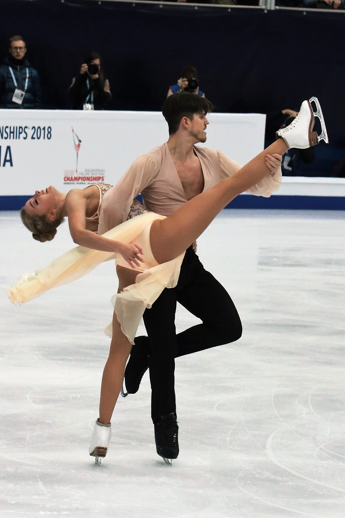 Александра Степанова / Иван Букин (Россия) на Чемпионате Европы по фигурному катанию 2018.